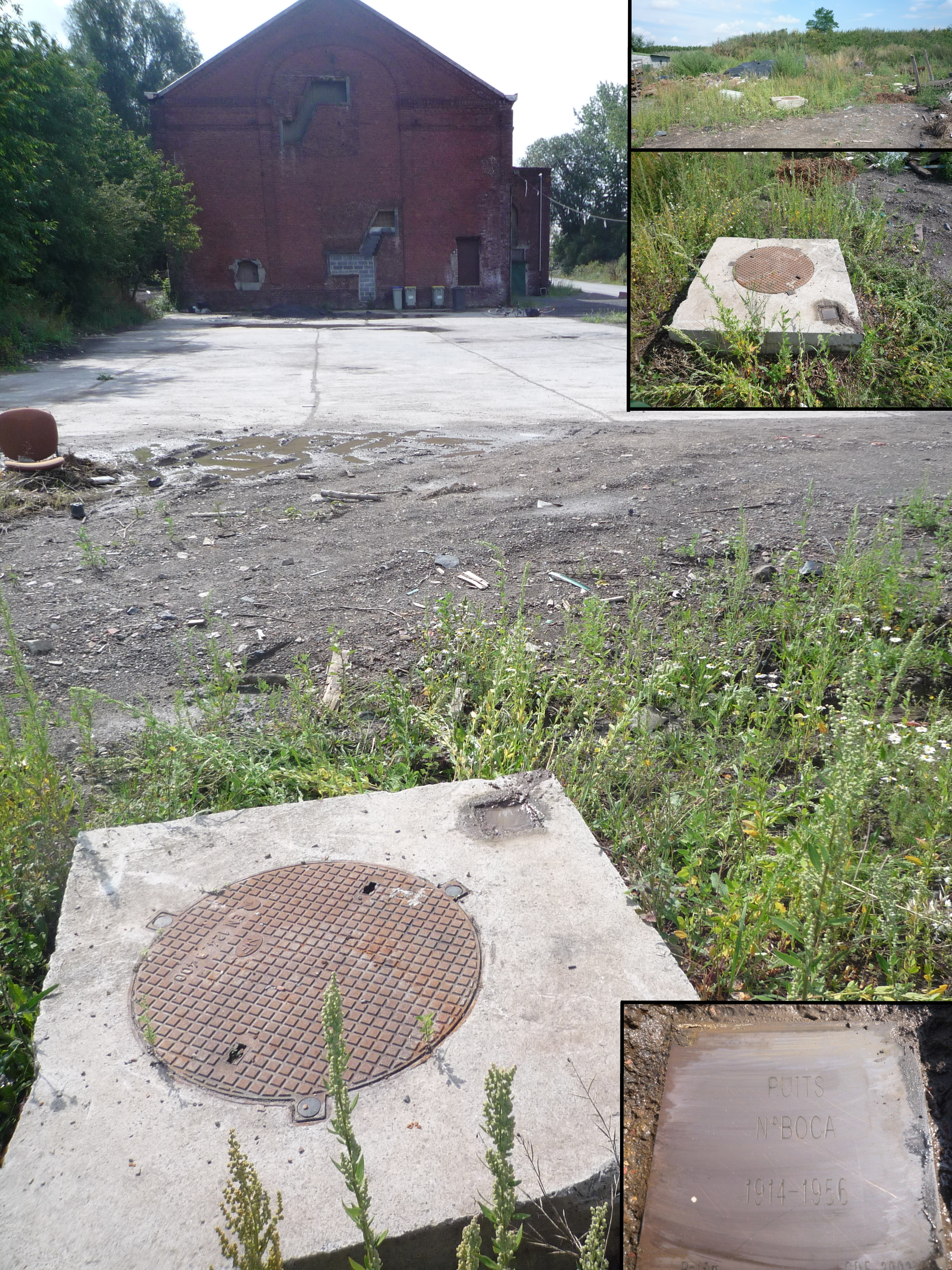 Puits Boca de la Compagnie des mines de Douchy à Douchy-les-Mines, Nord, Nord-Pas-de-Calais, France.